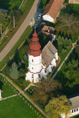 Vámosoroszi, Hungary, aerialphotgraphy